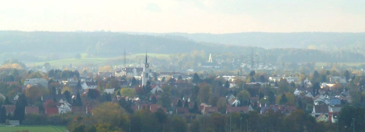 Foto von Neusäß, Bayern, Deutschland